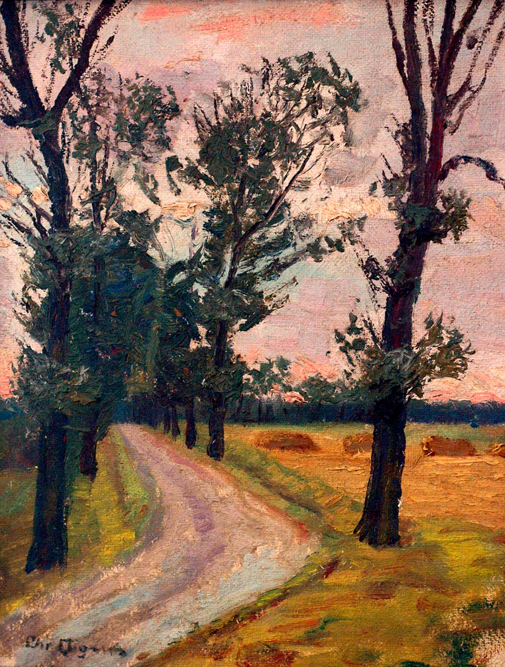 Christian Aigens: Landschaftsgemälde